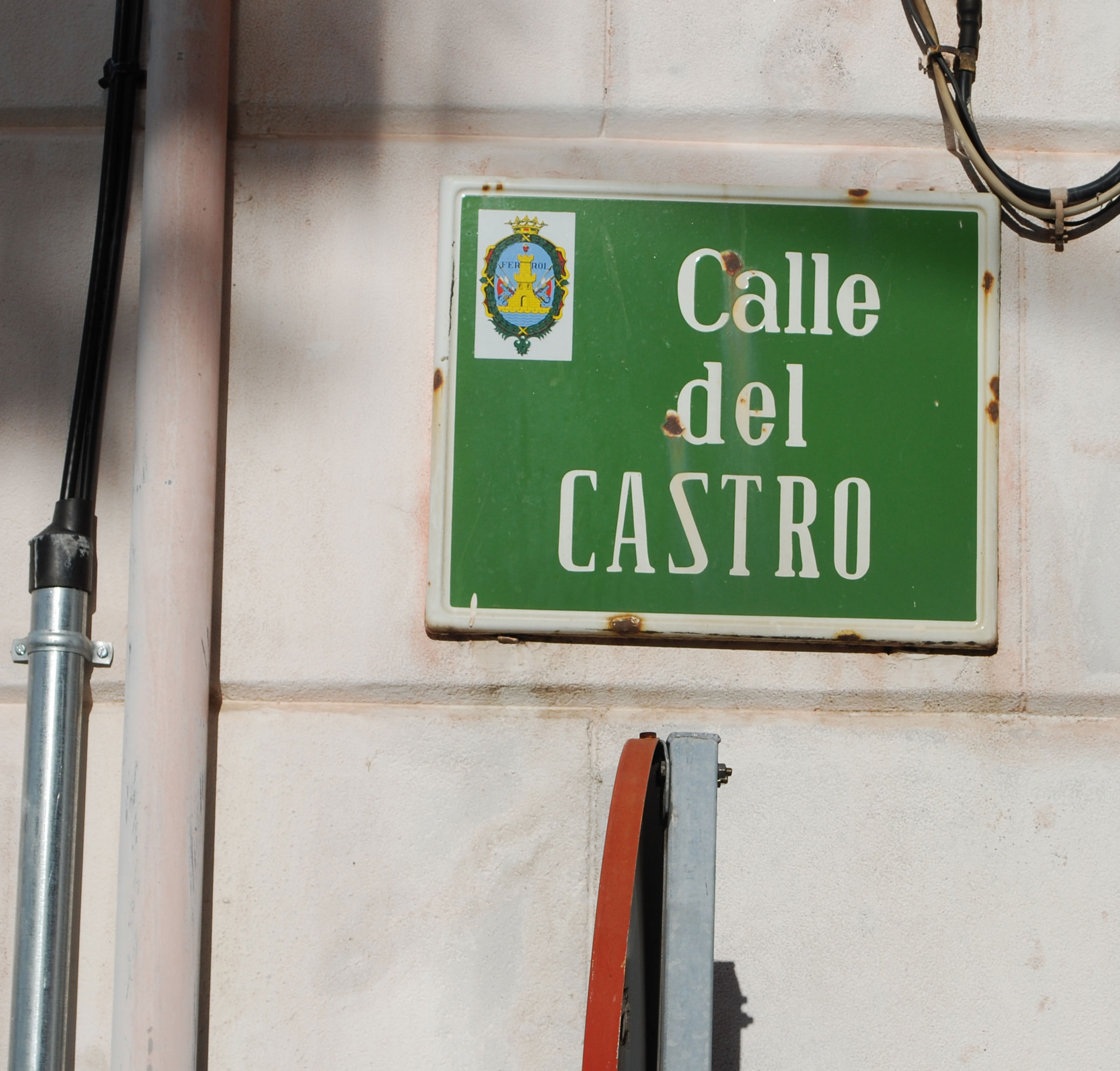 Rúa do Castro en Ferrol Vello porto de ferrol A Coruña Galiza Spain